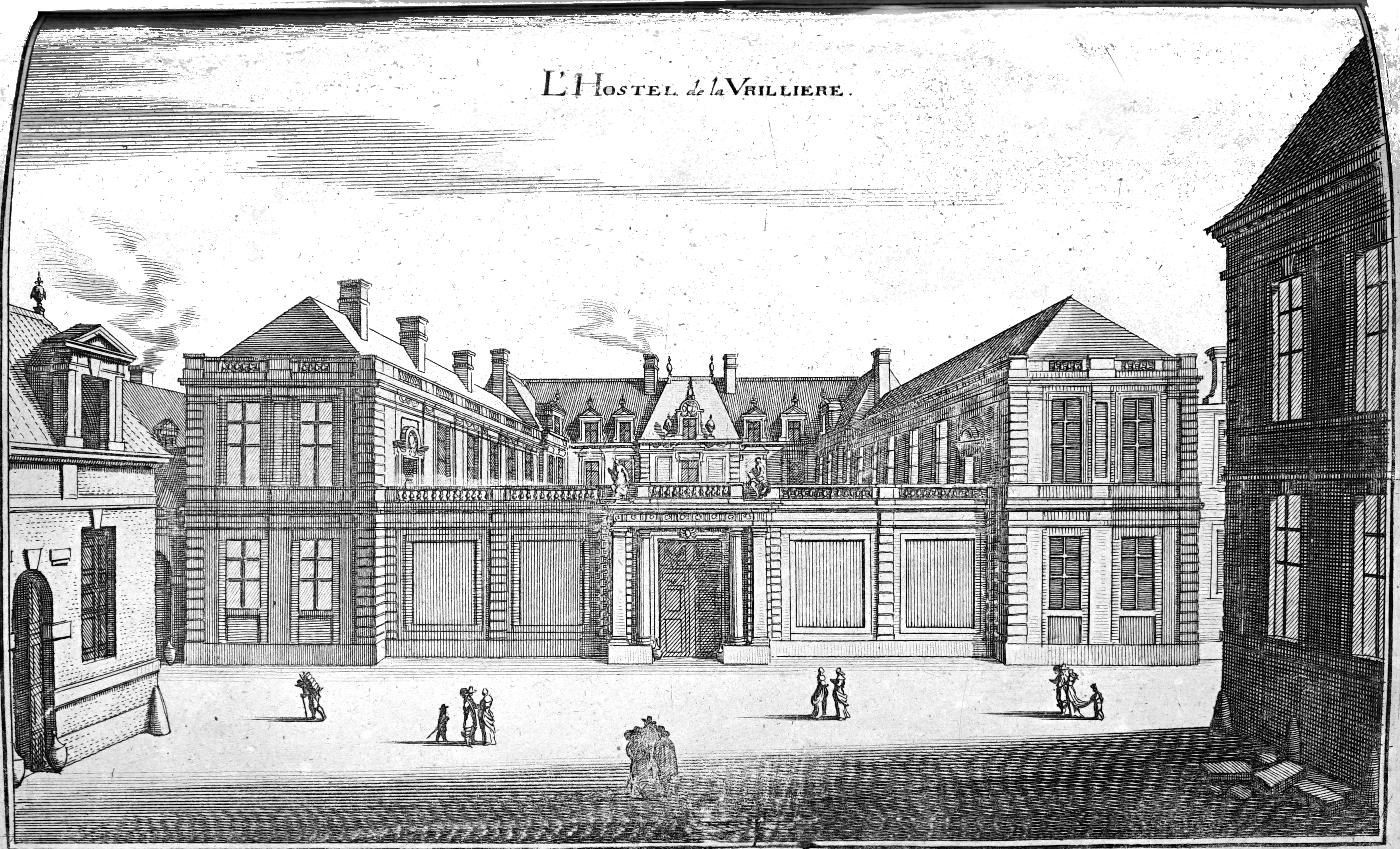 image provenant de Topographiae Galliae.